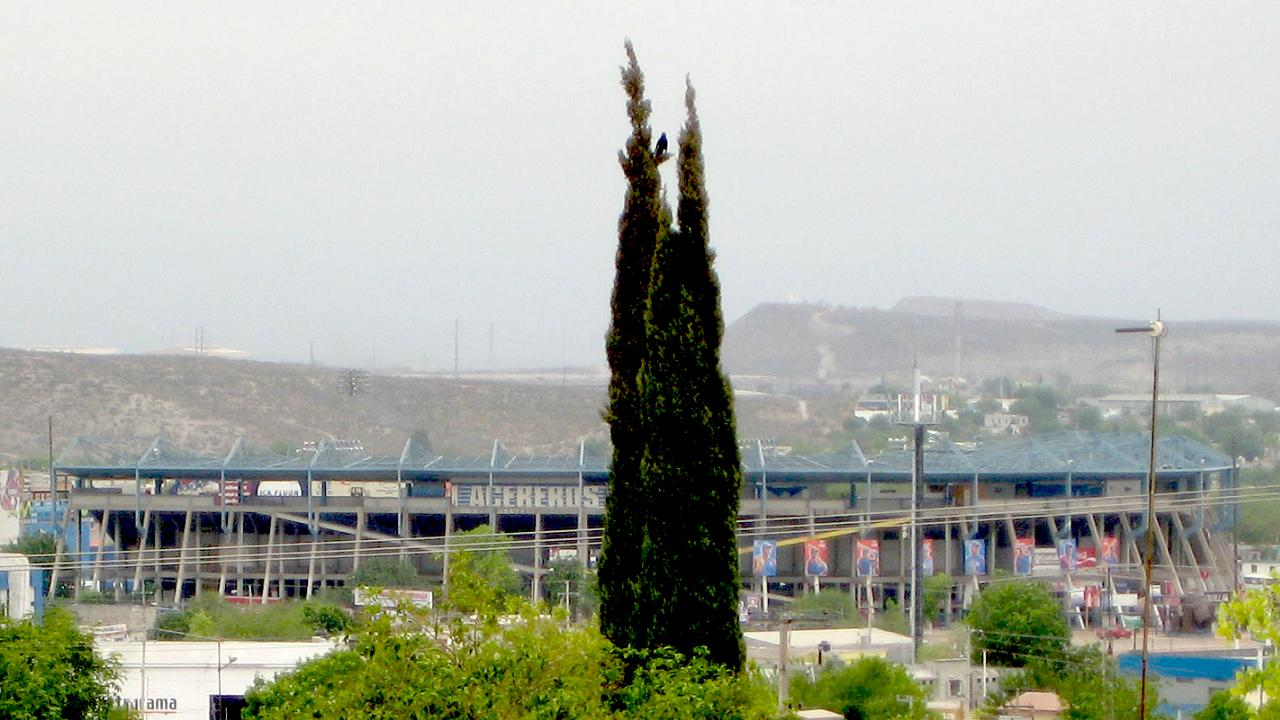 Estadio Monclova